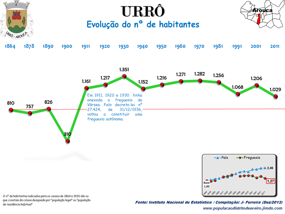 Evolução da População 1864 / 2011